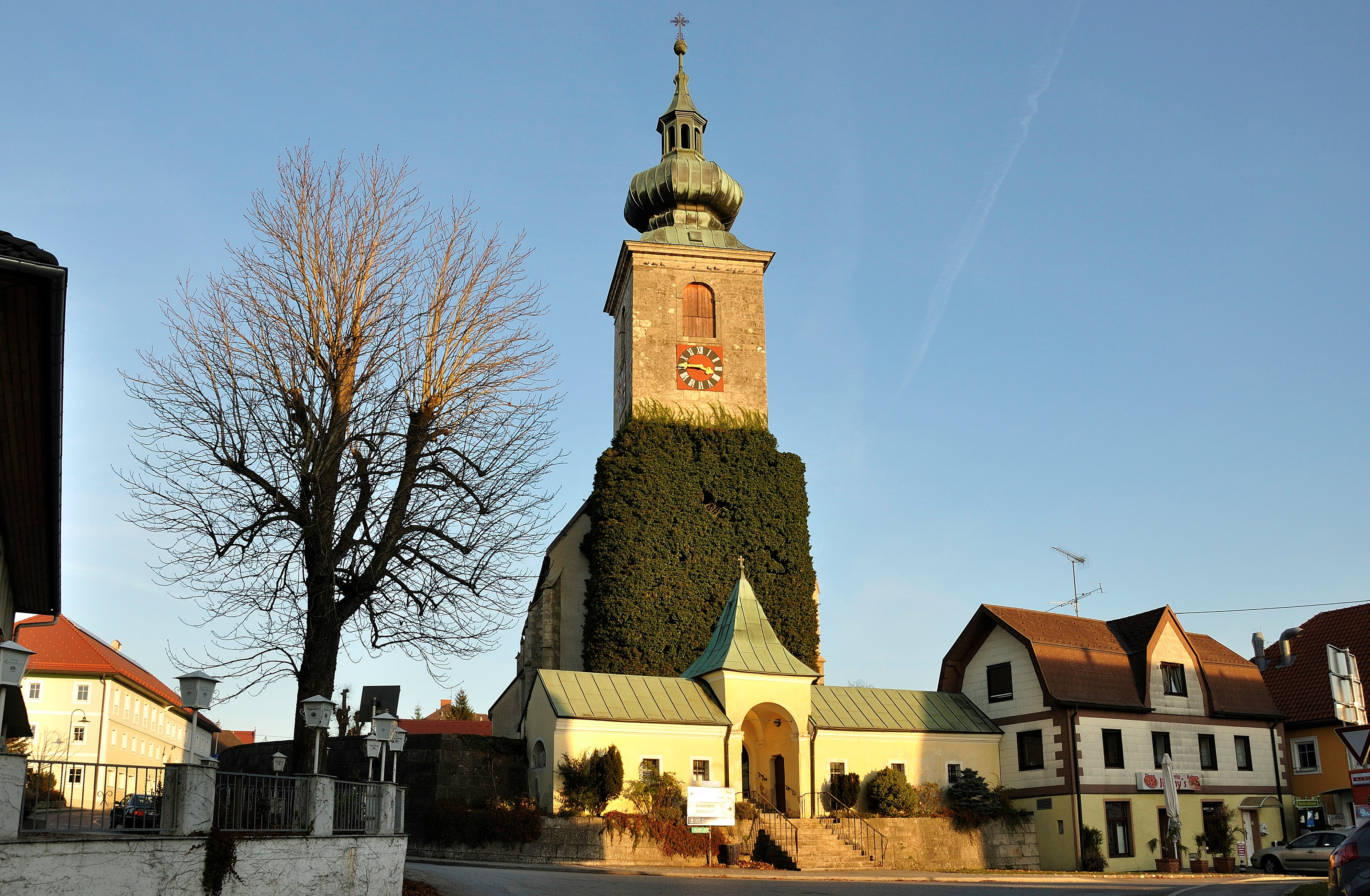 Kath. Pfarrkirche hl. Nikolaus, Ried im Traunkreis This media shows the natural monument in Upper Austria with the ID nd256 (Efeustock am Kirchturm).